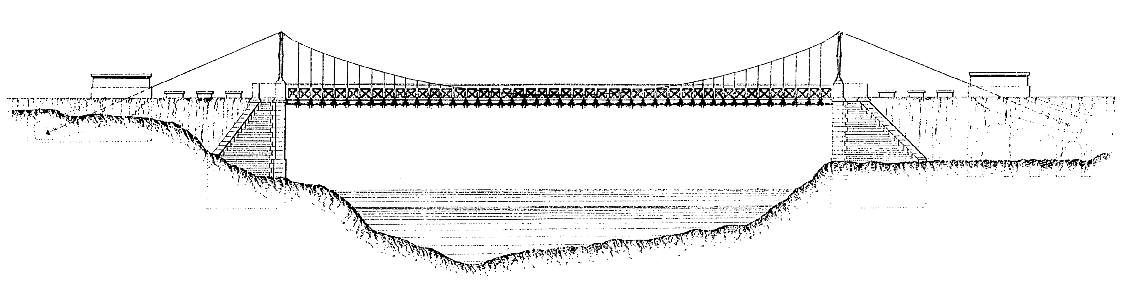 Planos del proyecto de "puente colgado" sobre el Pisuerga en Valladolid (en el mismo emplazamiento donde hoy está el Puente Colgante), publicados por la Revista de Obras Públicas (vol. I, núm. 10) el 15 de mayo de 1853, con las obras en ejecución.